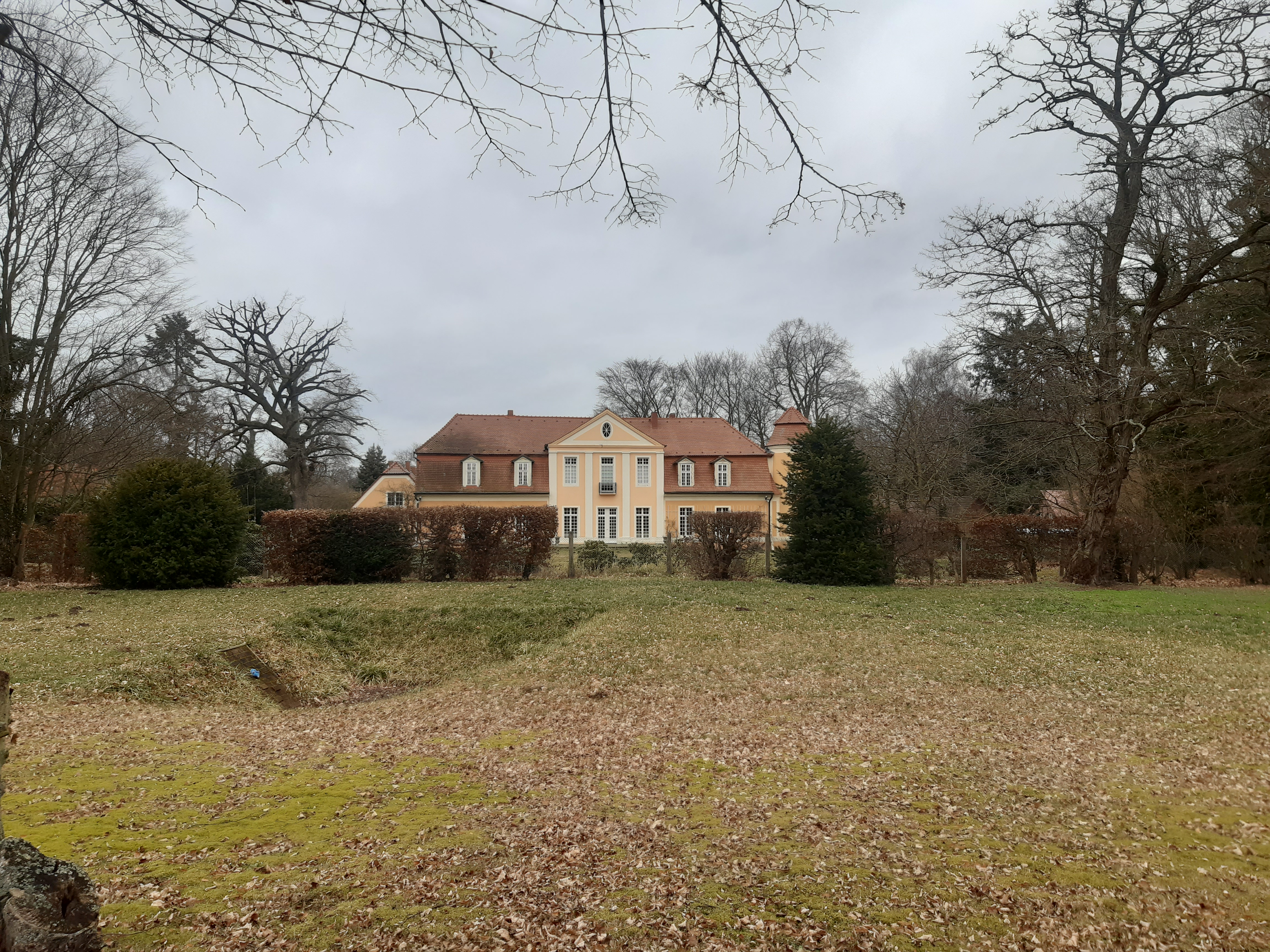 Gutshaus